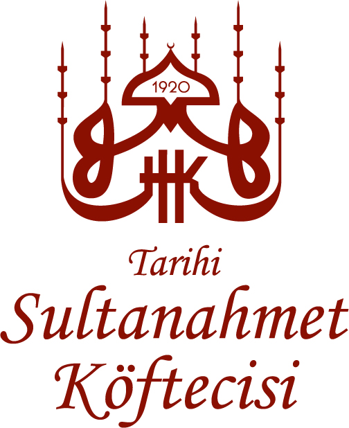 Tarihi Sultanahmet Köftecisi Logo